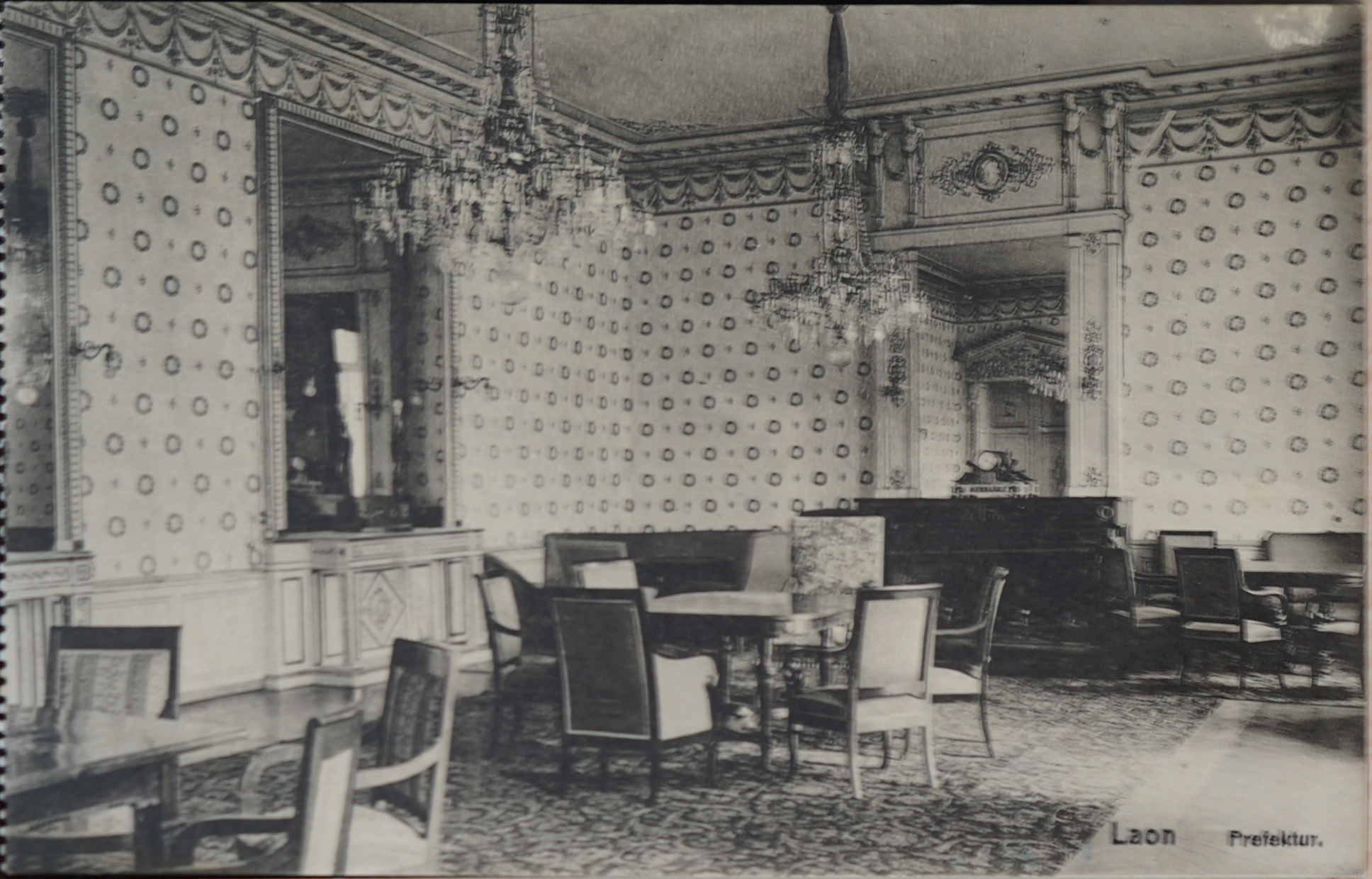 vue sur une carte ancienne.